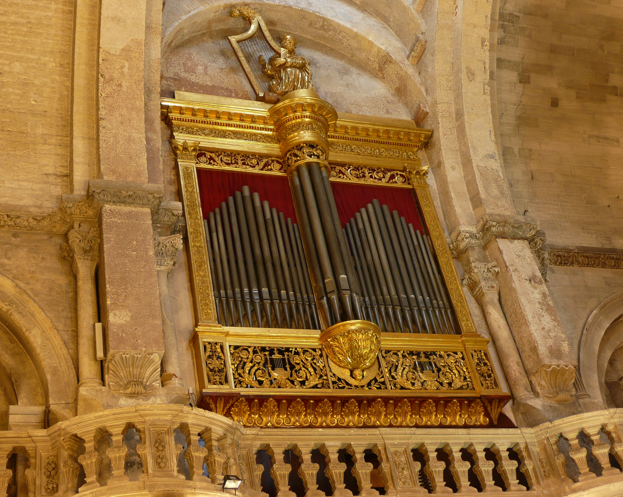 Dit:"Orgue Doré", construit en 1819 par, selon les sources, le lombard Piantanida ou son disciple Giovanni Mentasti.